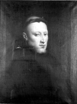 Ritratto di Onofrio Panvinio. Olio su tela. Ritratto a mezzo busto con il viso rivolto di tre quarti verso destra